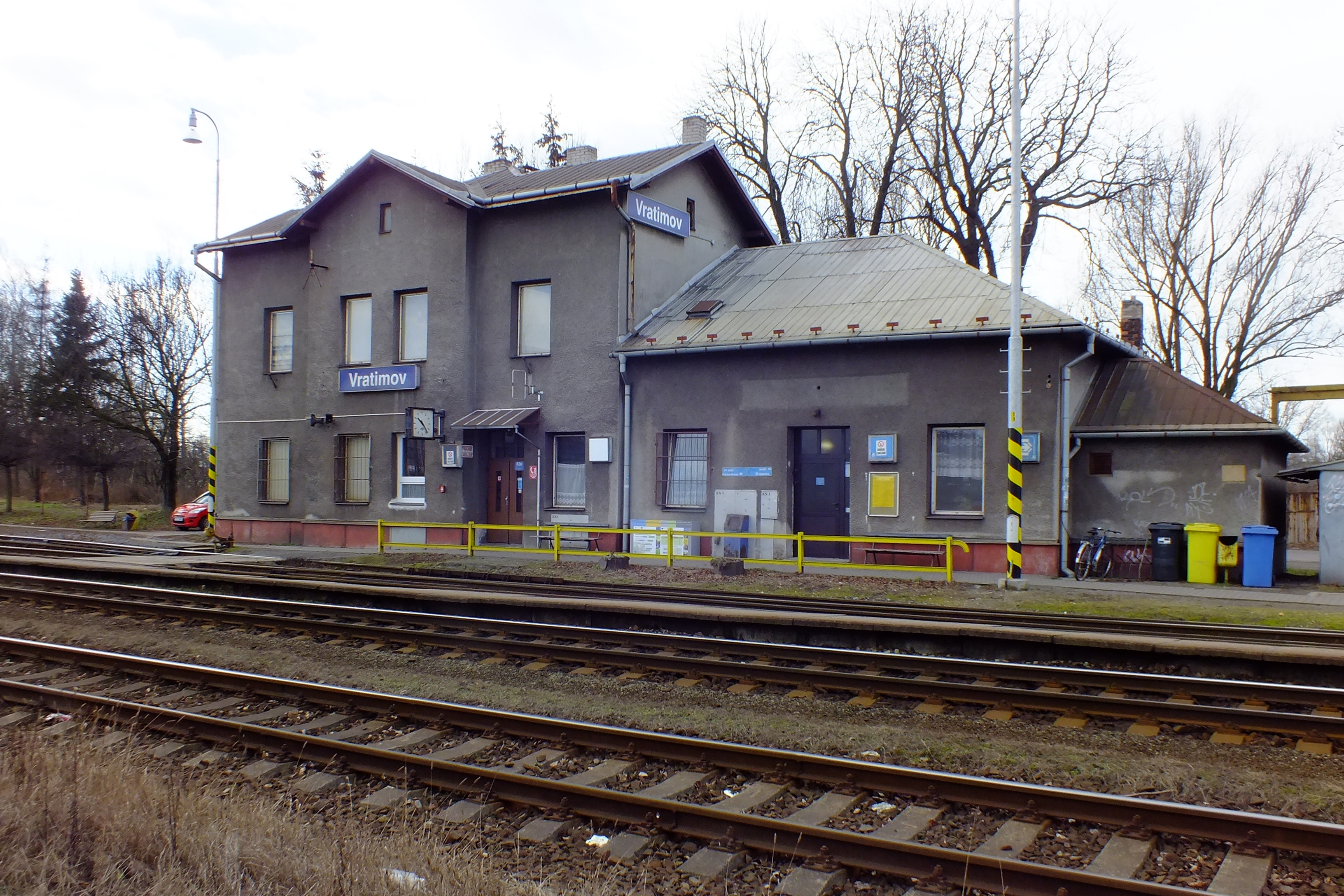 Železniční stanice Vratimov